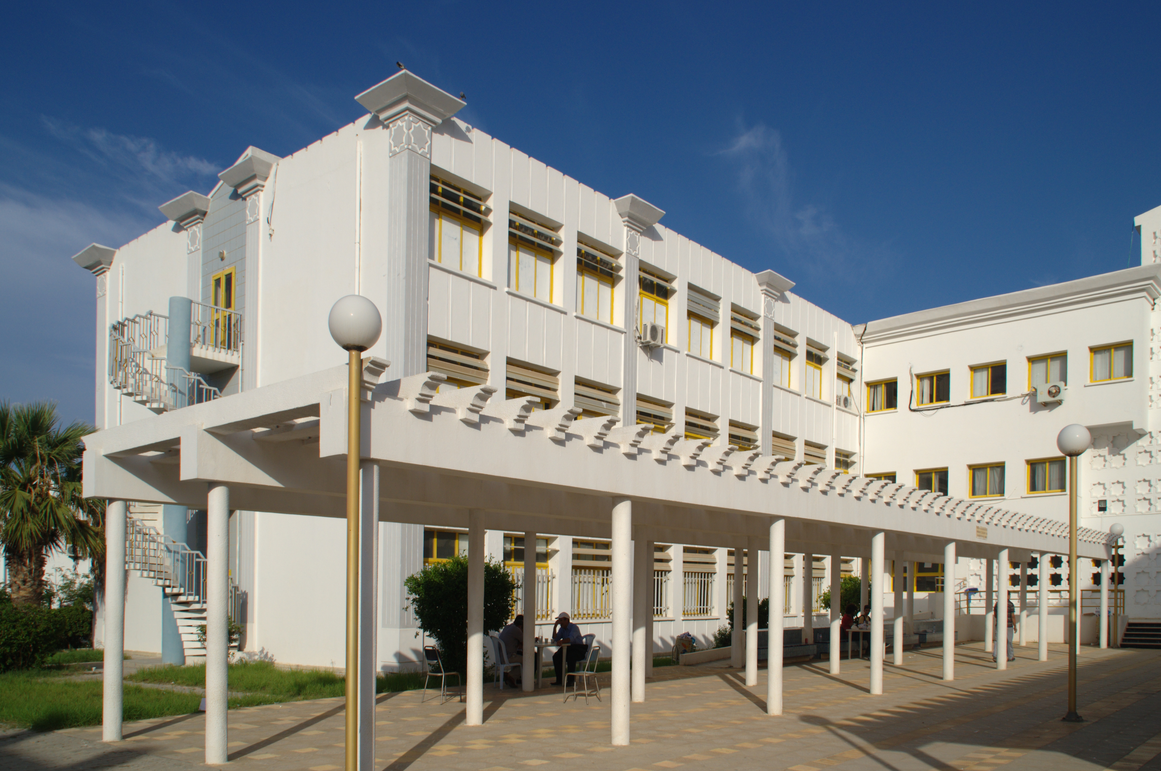 Iset de Sousse, Tunisie